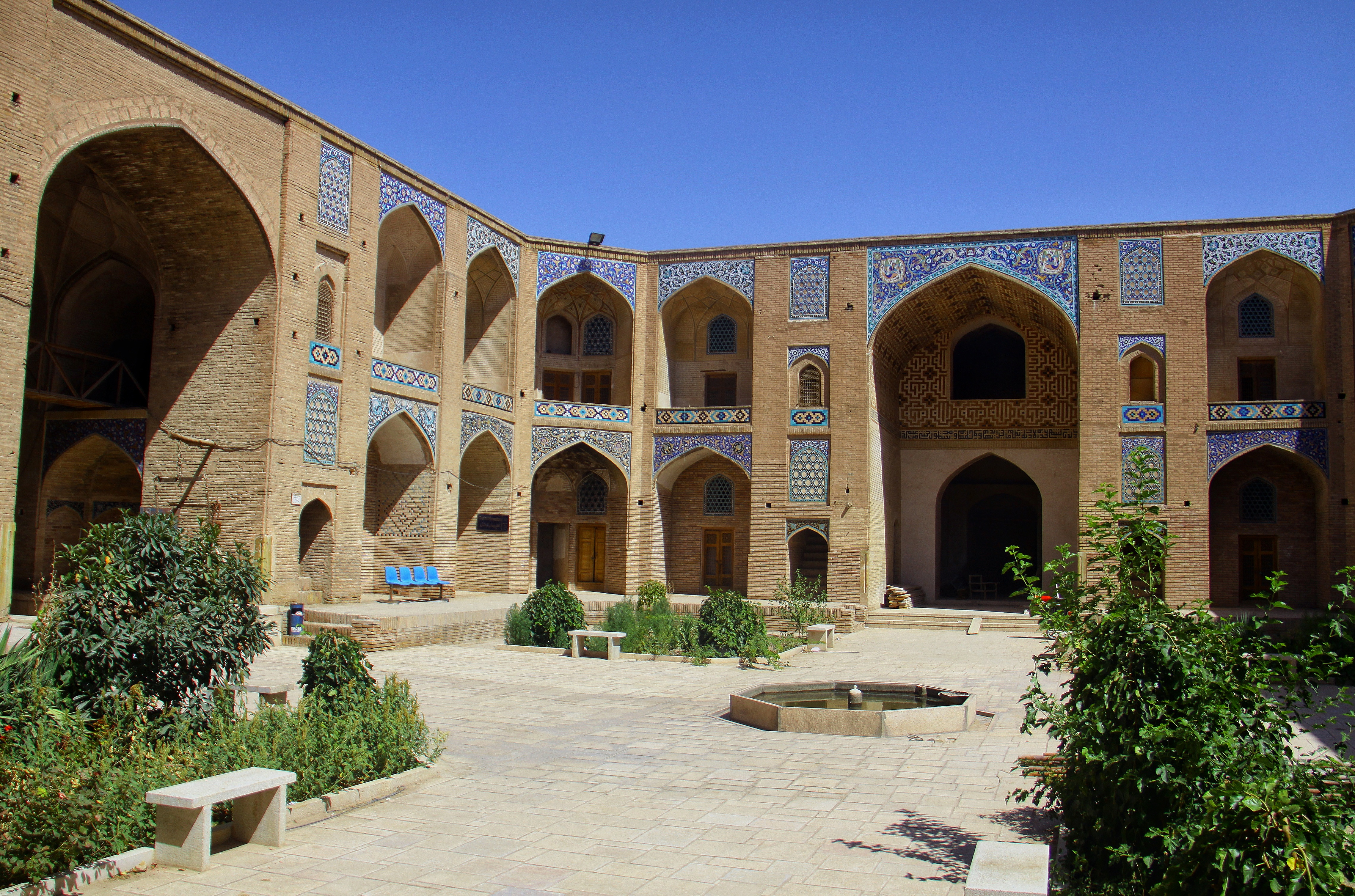 مدرسه گنجعلیخان/ کاروان‌سرای گنجعلی